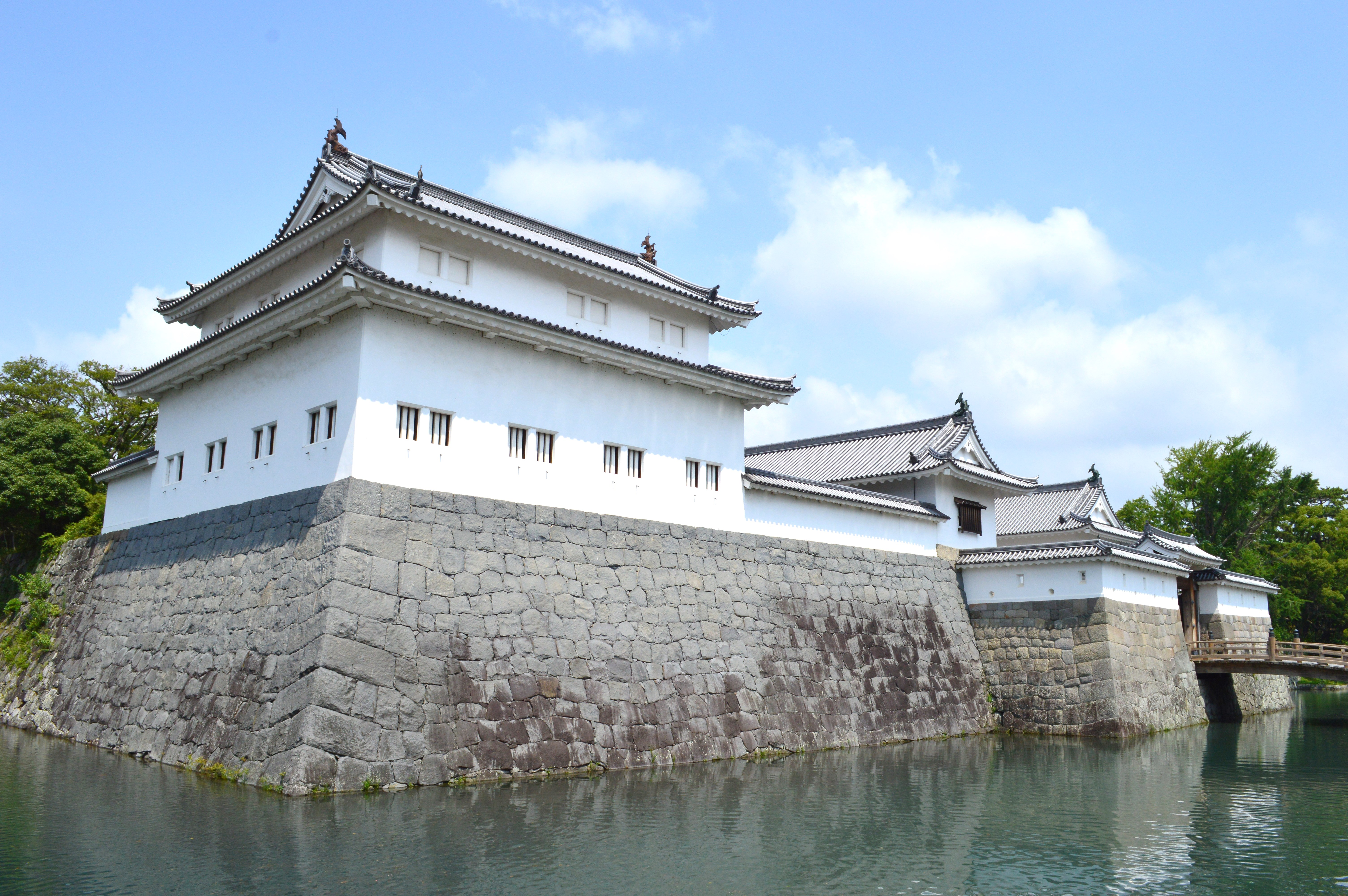 駿府城 巽櫓